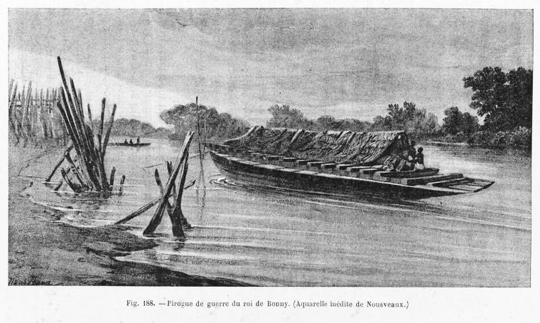 Pirogue de guerre du roi de Bonny, in Côte occidentale d'Afrique : vues, scènes, croquis, p. 337 Colonel Frey